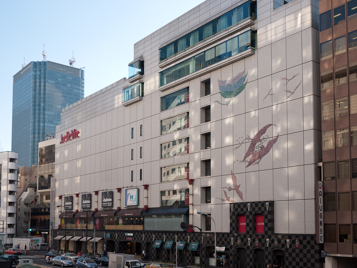 「belle Vie 赤坂」東京メトロ赤坂見附駅。